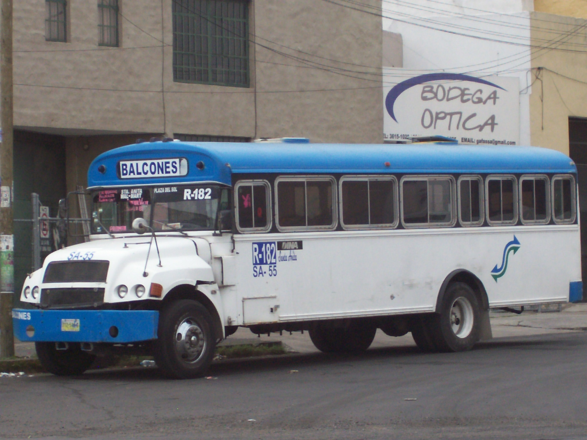 Autobus de la linea Santa Anita Suburbana